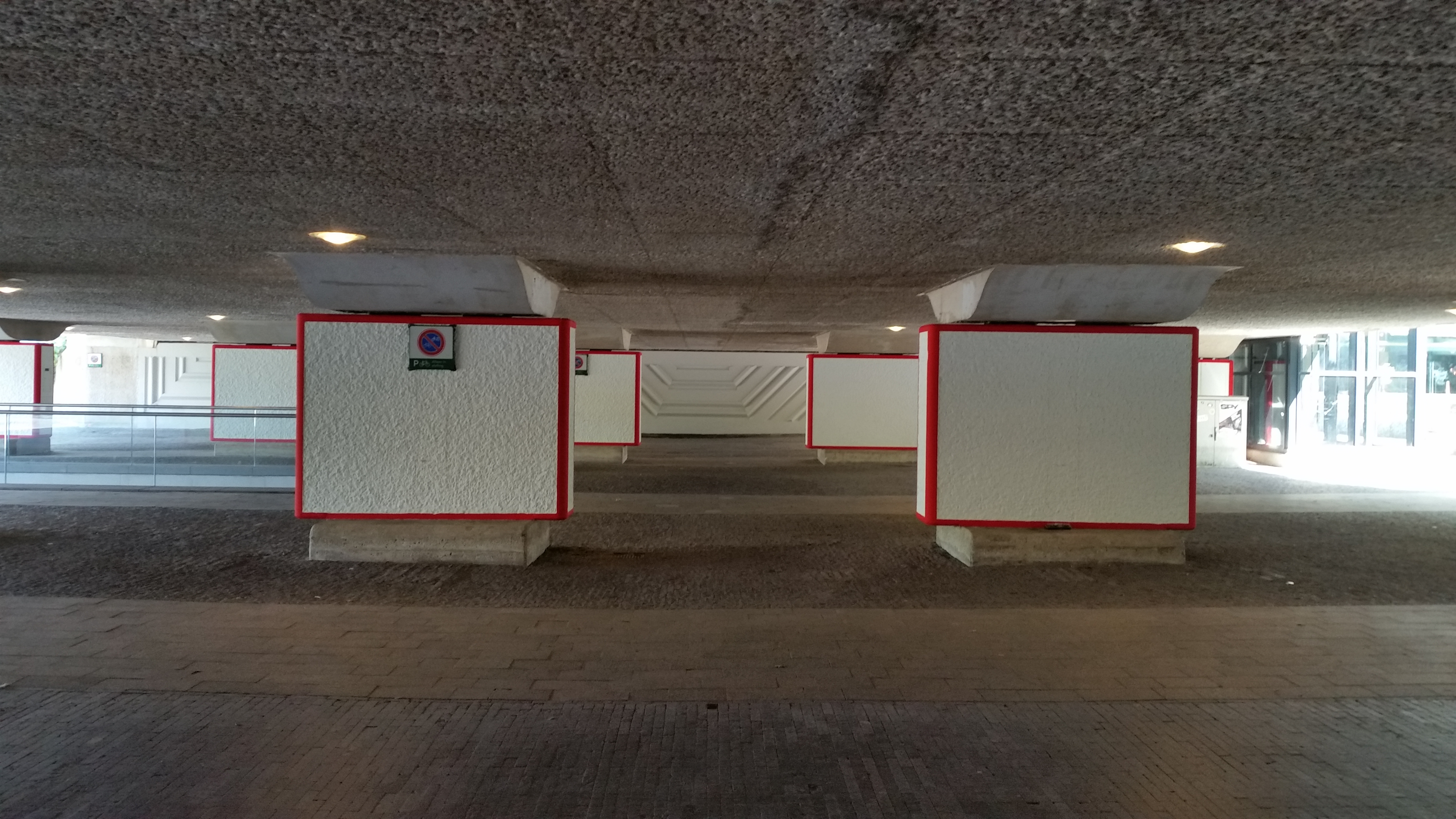 Onderzijde van Brug 863 (in Amsterdam); het rood-witte is kunstwerk Red frames